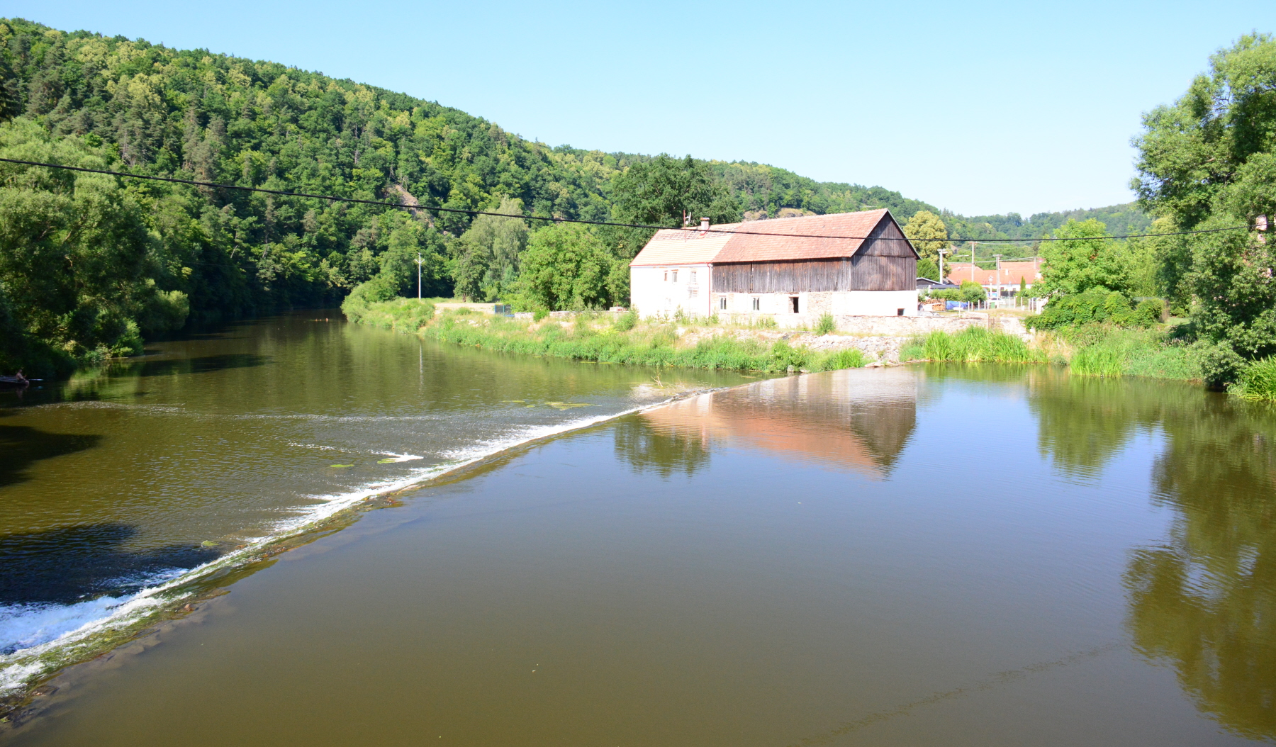 Die Thaya mit Wehr und Mühle in Podhradí nad Dyjí - Freistein in Südmähren (Tschechische Republik)